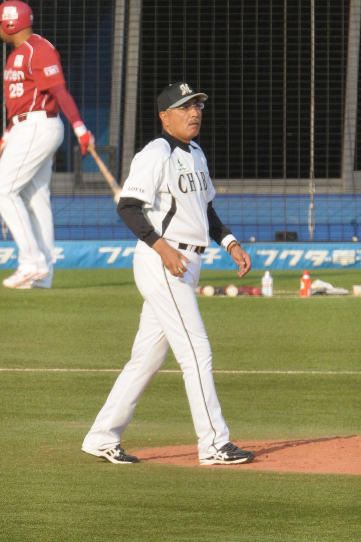 千葉ロッテマリーンズ、斉藤明雄コーチ。QVCマリンフィールドで。